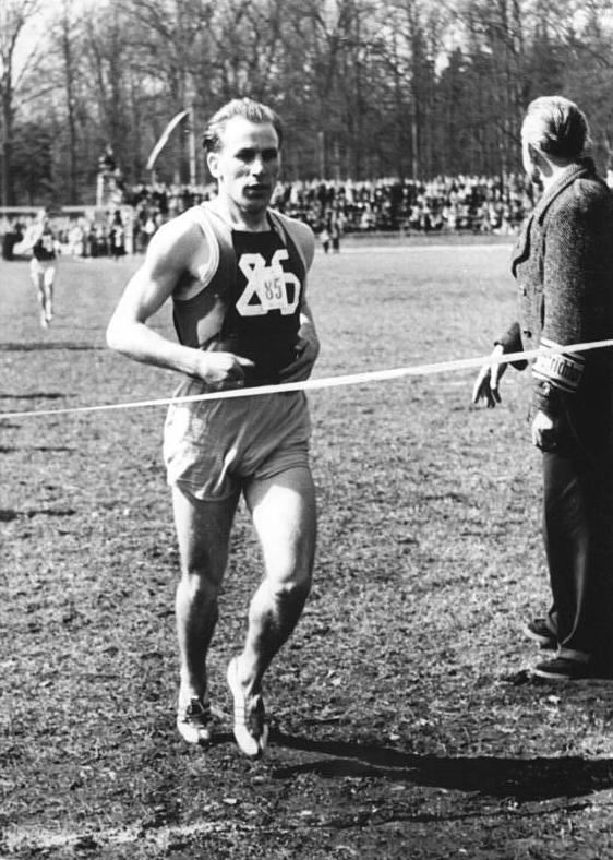 Fritz Janke Zentralbild Löwe Boy-L 14.4.1958 Deutsche Waldlaufmeisterschaften 1958 in Zittau Am Sonntag, dem 13.4.1958, fanden in Zittau die Deutschen Waldlaufmeisterschaften 1958 statt. Während sich bei den Frauen Antonia Jüttner (DHfK) den Titel sicherte, wurde bei den Männern Siegfried Herrmann (Chemie Halle, 2500 m) bezw. Friedrich Janke (Vorwärts Berlin) über 7500 m neue Meister. UBz: Der Sieger des 7500-m-Laufes, Fritz Janke passiert das Ziel.